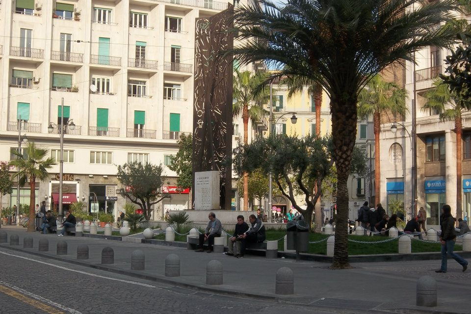 Piazza Carità, Napoli